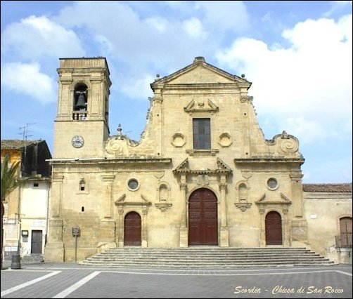 Immagine presa dal Sito del Comune di Scordia che raffigura la chiesa di San Rocco di Scordia.